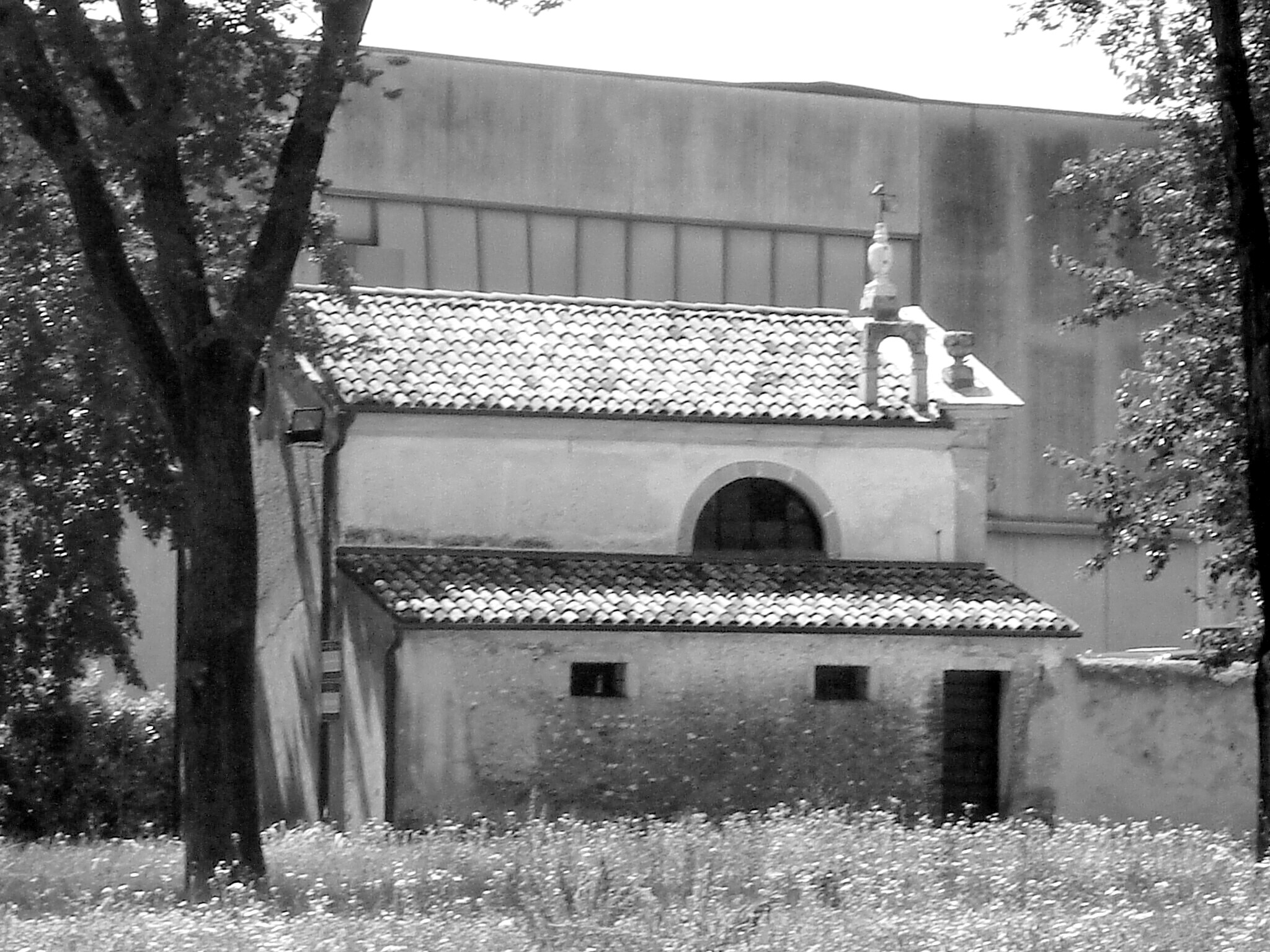 Castello Roganzuolo (San Fior, Treviso, Italia): profilo dell'oratorio settecentesco di Villa Liccer dedicato a San Giovanni Battista, stretto dai capannoni della zona industriale.